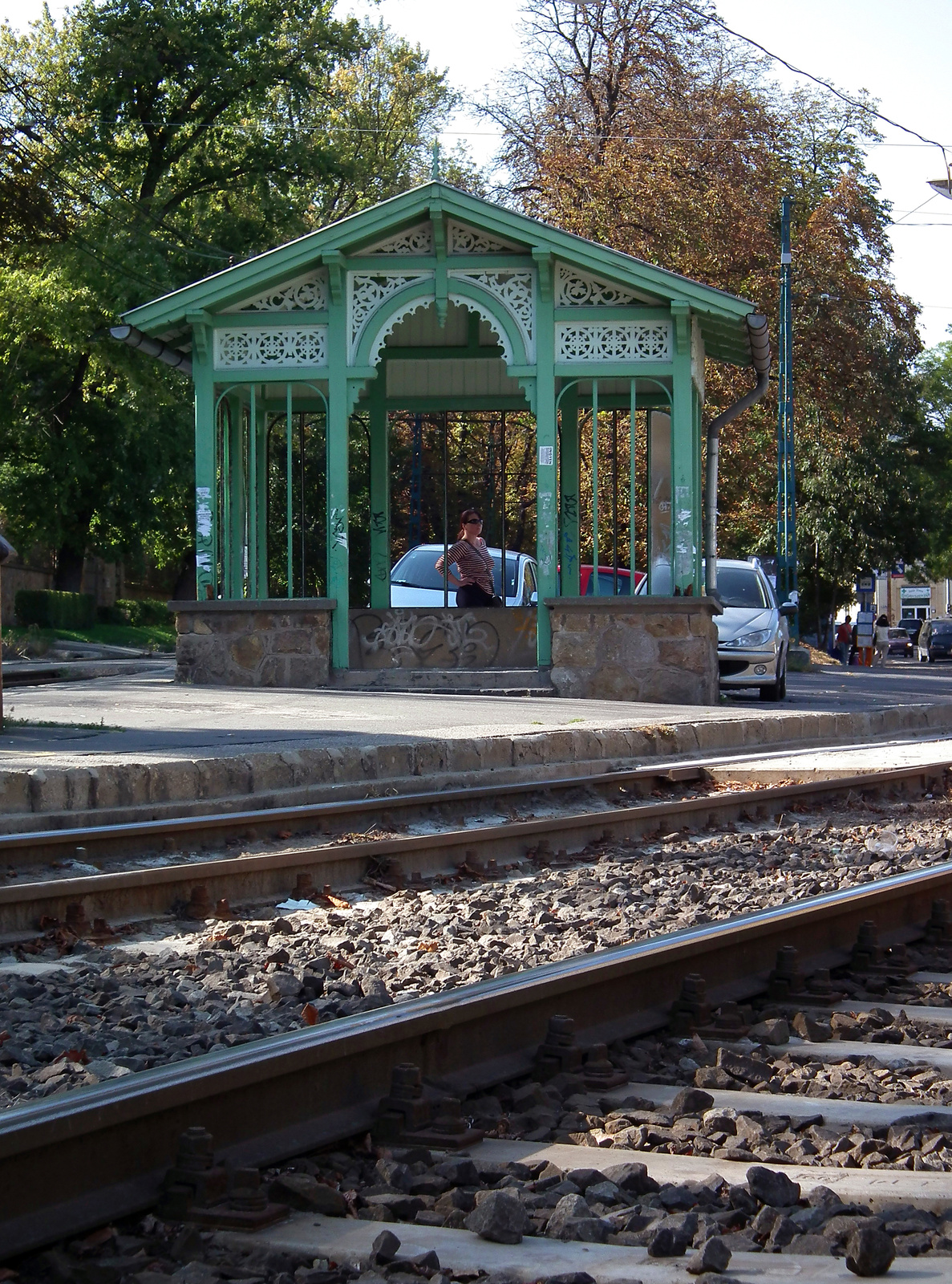 56-os és 58-as villamos Budagyöngye elágazás megállója (Budapest 12, Szilágyi Erzsébet fasor 10.) This is a photo of a monument in Hungary. Identifier: 1169